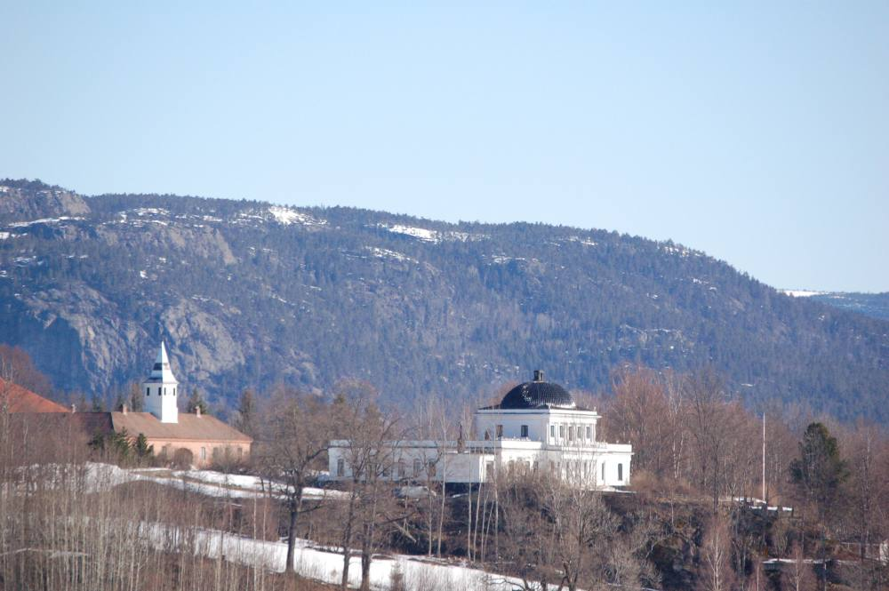 Ulefoss Hovedgaard utsikt